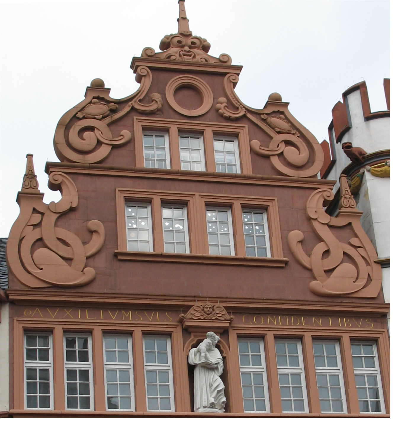 Rout Haus zu Tréier, en Deel vun der Fassad.